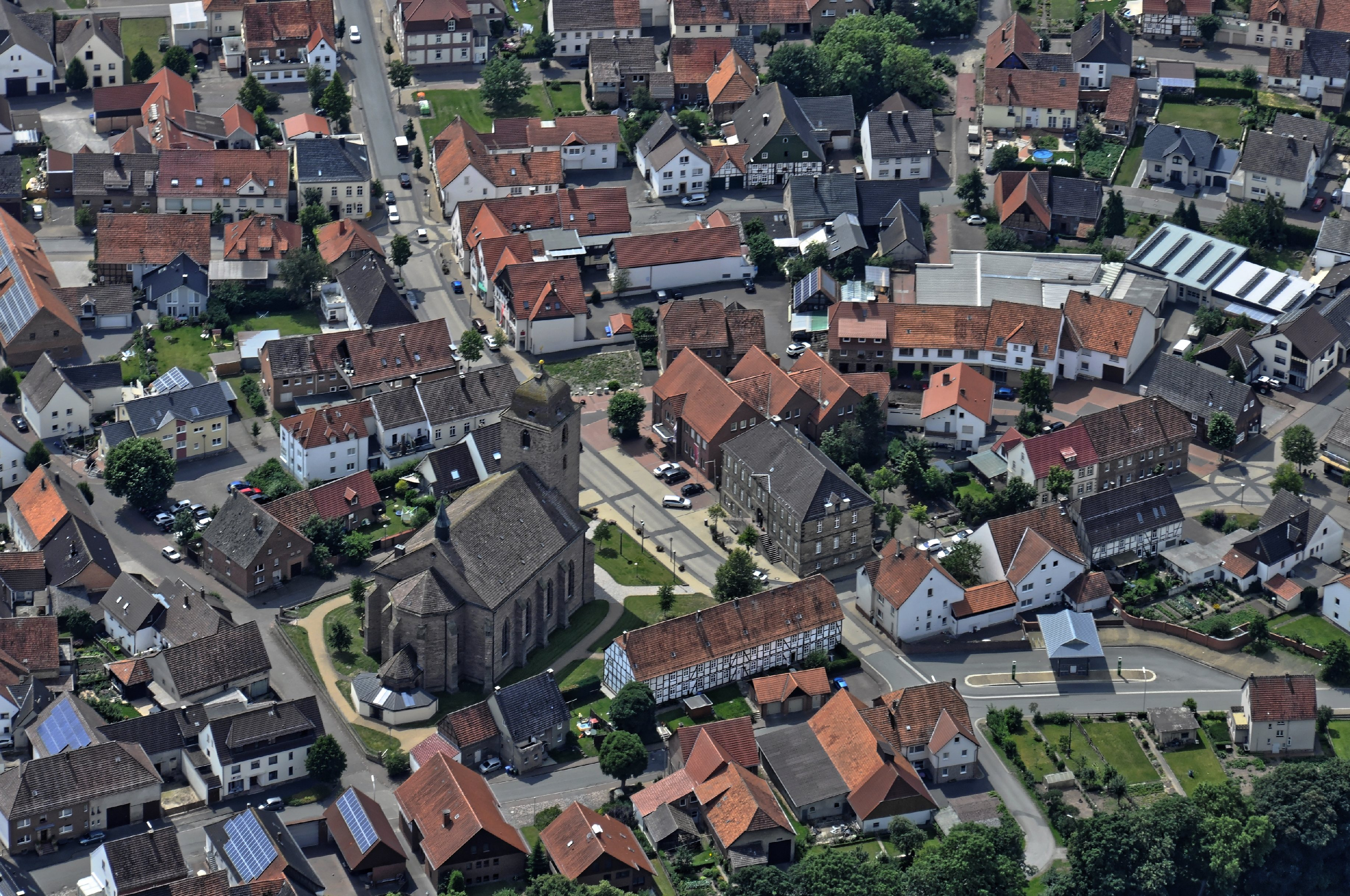 Bilder vom Flug Nordholz-Hammelburg 2015: Die Pfarrkirche St. Johannes Baptist in Borgentreich